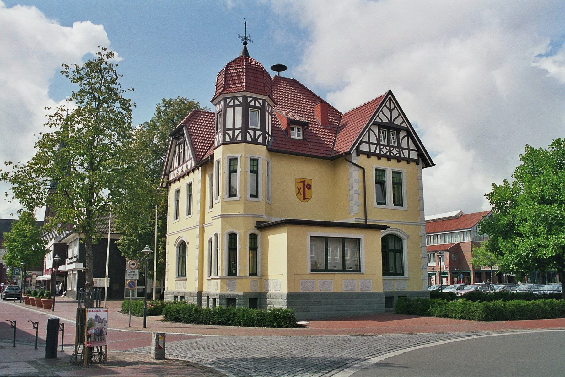 Dieses ist das Rathaus in Dinklage, ehemals auch als „Villa Dr. Meyer“ bekannt gewesen. Die Aufnahme entstand im August 2006 mit einer analogen Spiegelreflex-Kamera, ich habe sie selber gemacht.